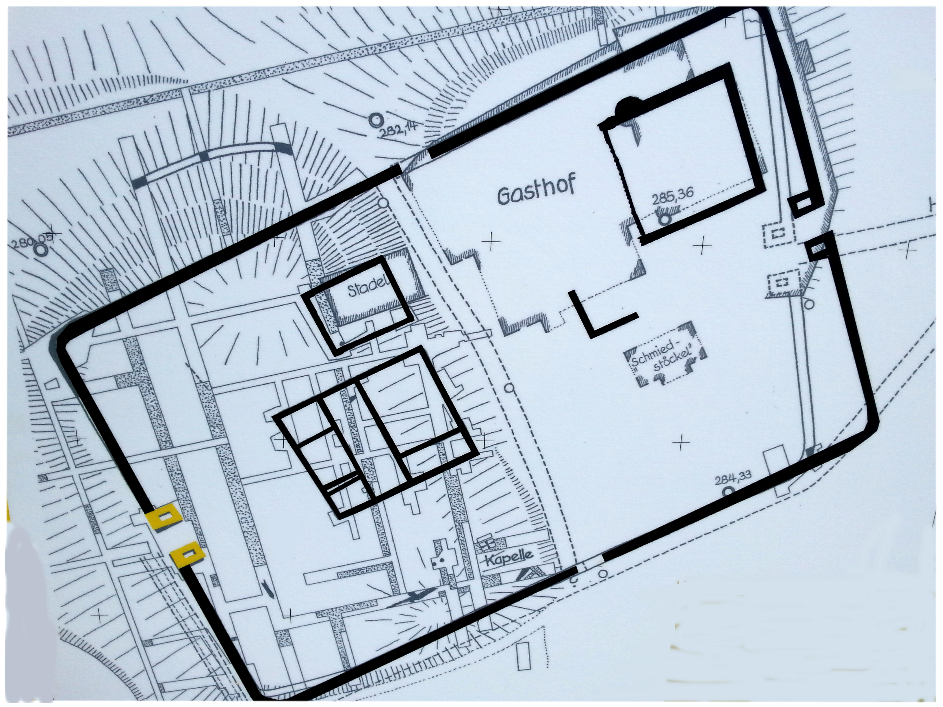 Befundplan des Kleinkastells Schlögen/Österreich (Ioviacum).Überblendung des Grabungsplans aus den 1960er Jahren mit Sondierungsergebnissen von 2017.